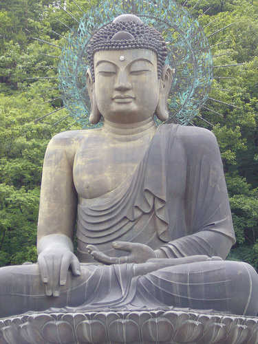 Budda Statue in Seorok Park., Korea